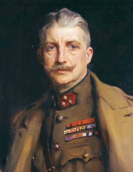 Robert Marie Léon, 7th Duc d’Ursel